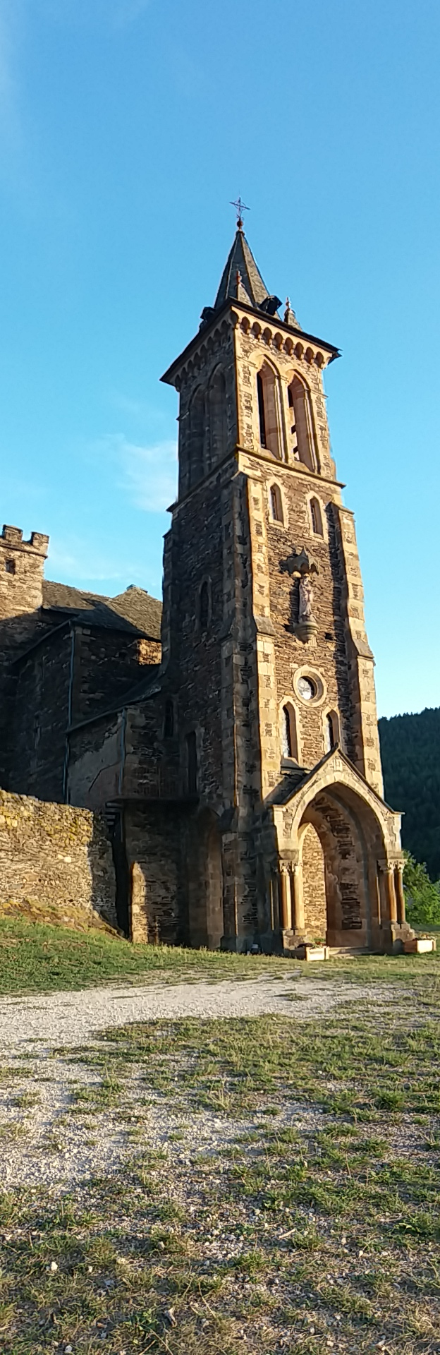 Collégiale de Bedouès (Lozère, France)